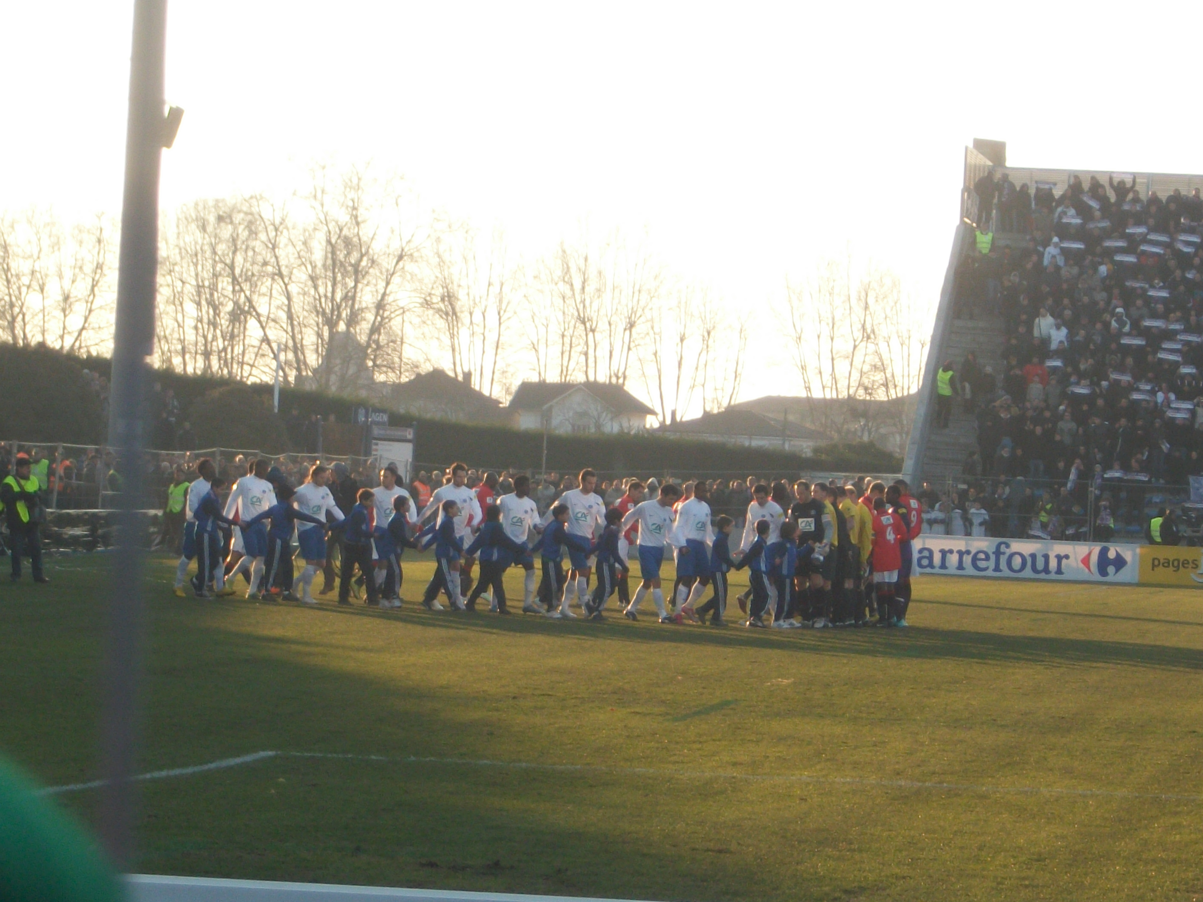 Entrée des joueurs lors du match de Coupe de France entre Agen et Paris le dimanche 23 janvier 2011